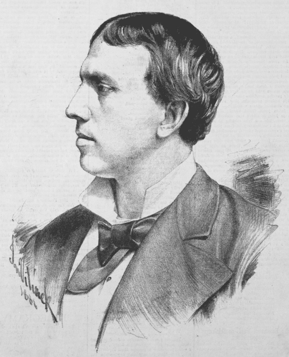 Jiří Bittner (1846 - 1903), herec. Portréty osobností od Jana Vilímka